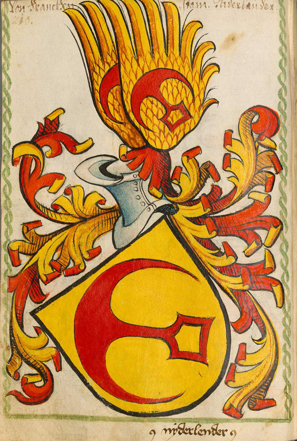 Scheibler'sches Wappenbuch , älterer Teil Niederländer Frankenstein